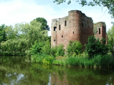 De ruïne Ravesteyn, Heenvliet, gemeente Bernisse.